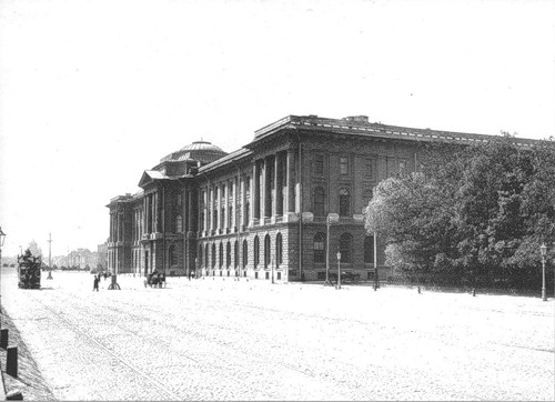 Здание Императорской Академии художеств в 1903 году.